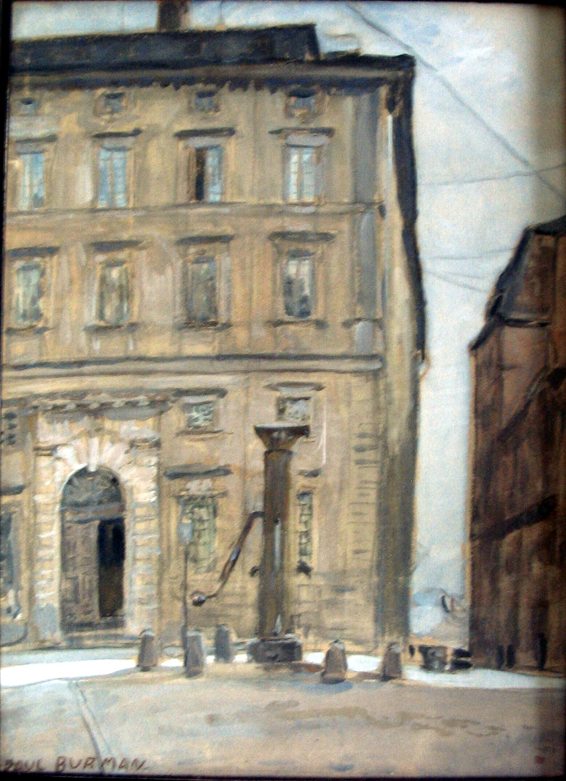 Kunst, Paul Burman